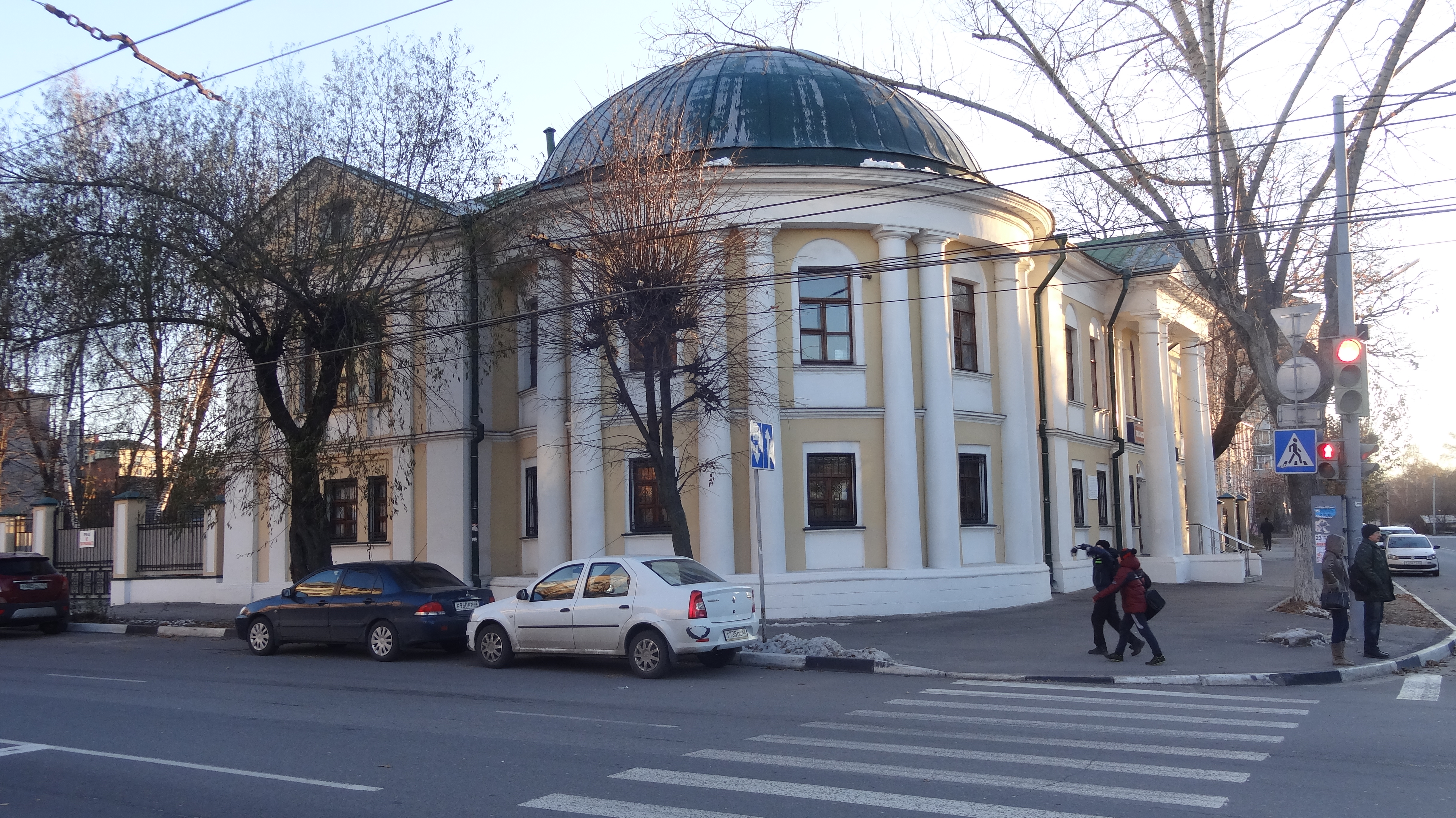 Богадельня Мальшинская (Рязанская область, Рязань, улица Маяковского, 41)